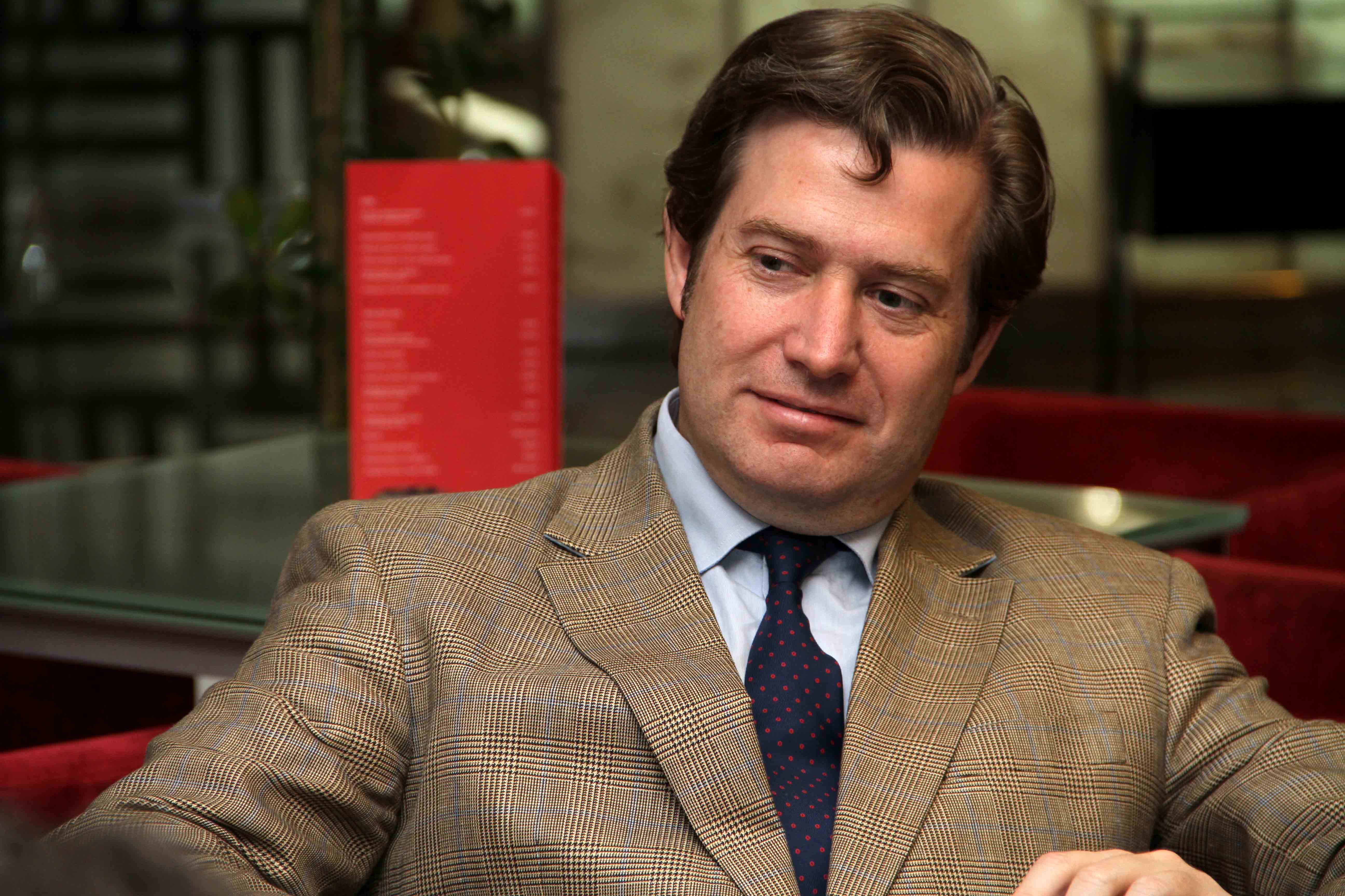 Club Encuentro Manuel Broseta - Valencia